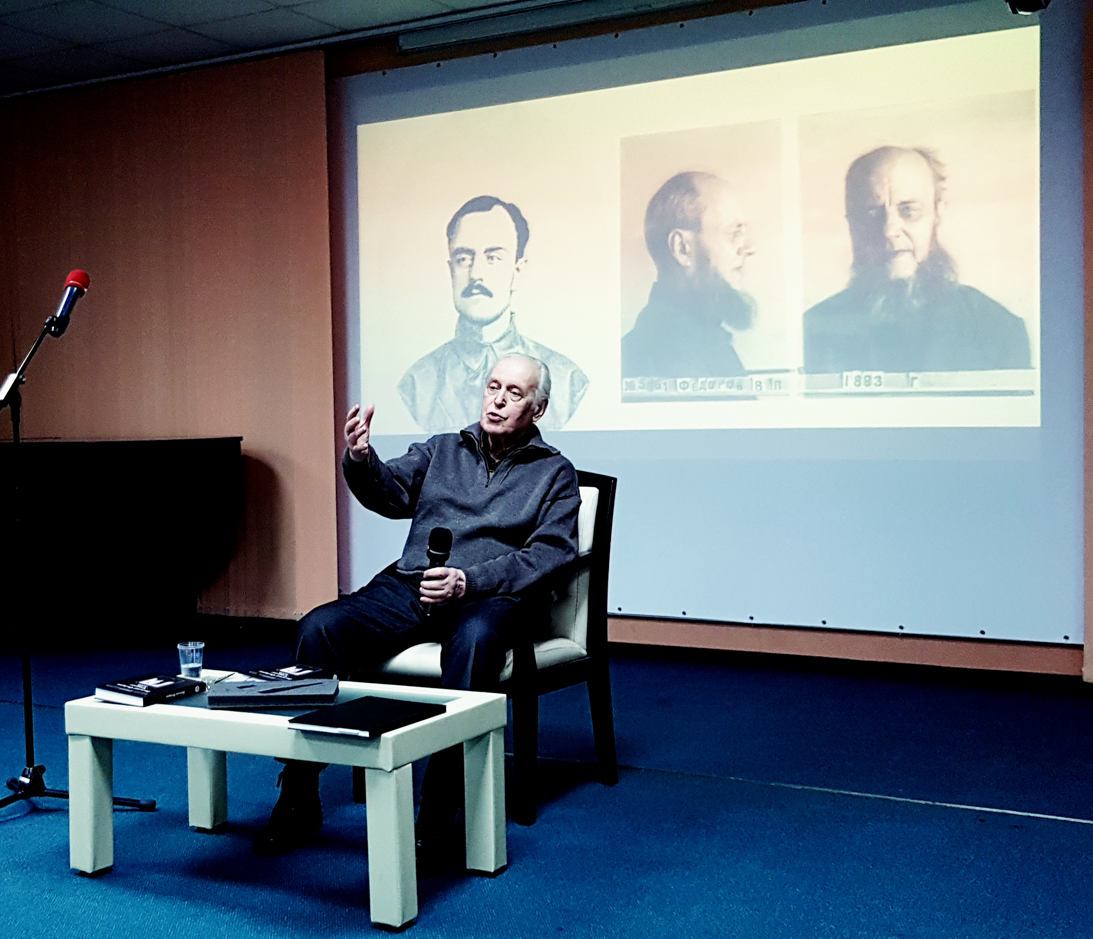 Владимир Александрович Дроздков - литературовед и коллекционер - на презентации сборника стихов Василия Павловича Фёдорова (1883—1942) "Усталое небо" в Библиотеке им. Н.А.Некрасова